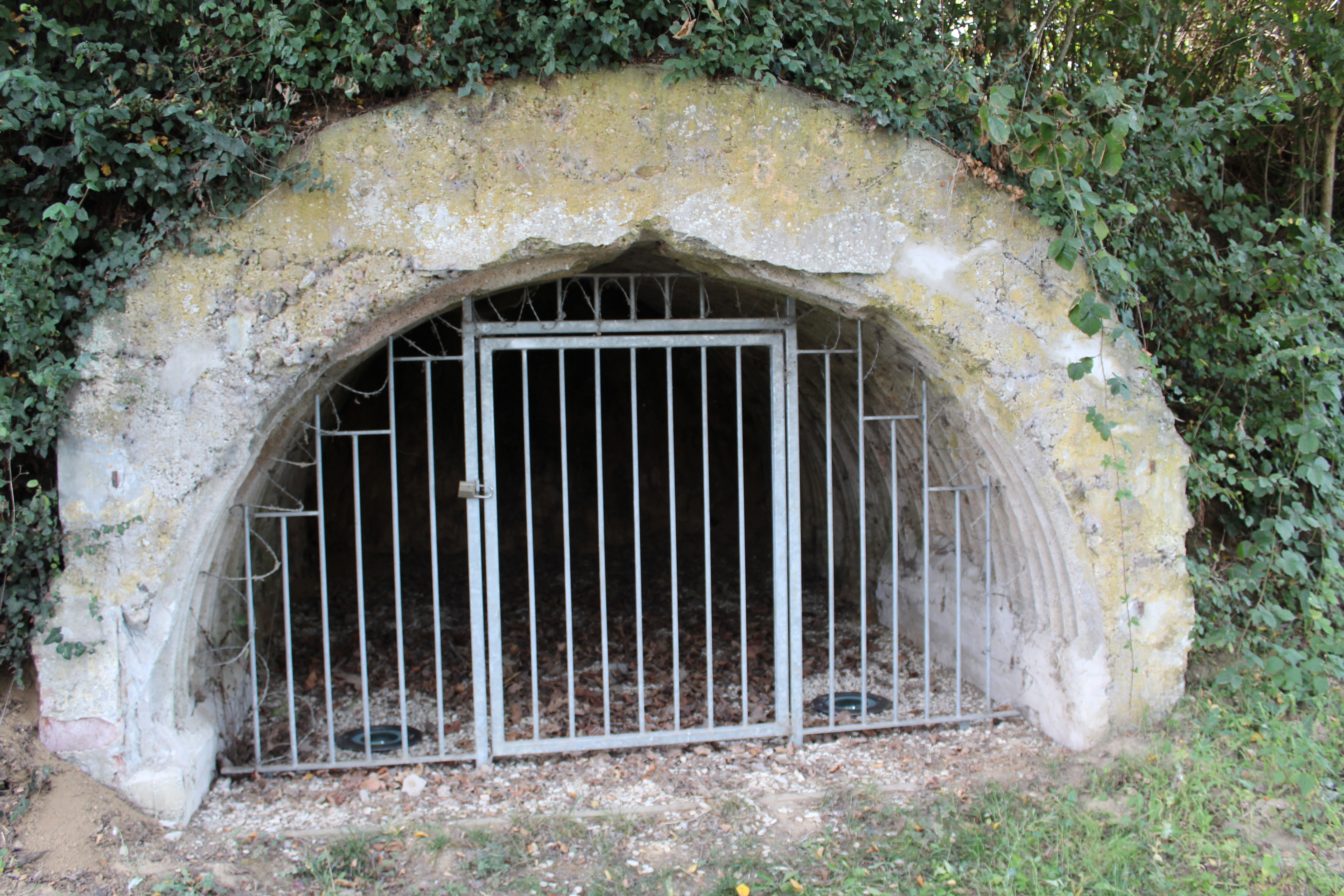 Casemate allemande 14-18